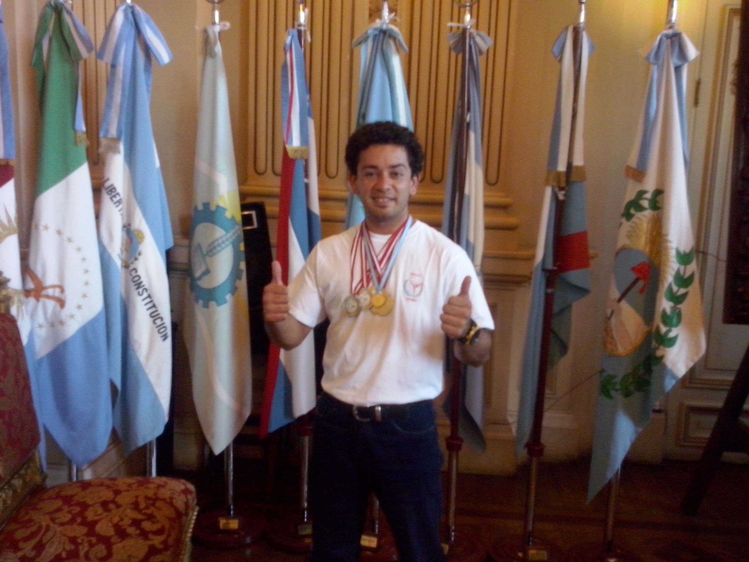 Néstor Guillermo Álvarez en casa de gobierno de Jujuy con sus medallas de plata y oro.